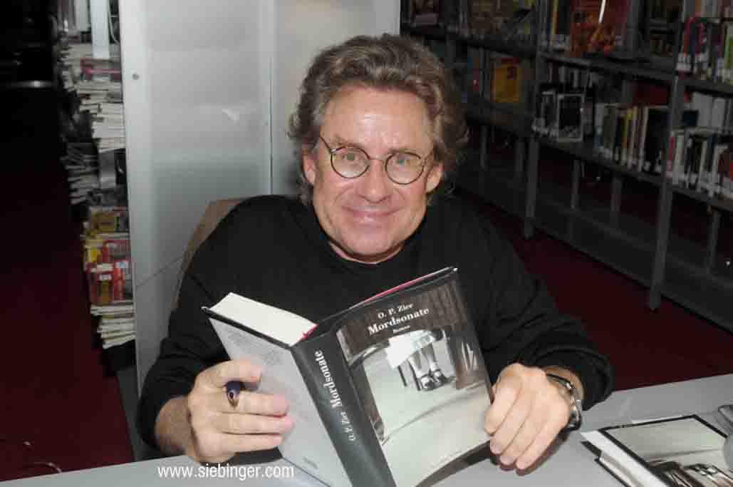 Der Autor O.P. Zier bei der Präsentation seines neuesten Werkes MORDSONATE in Salzburg